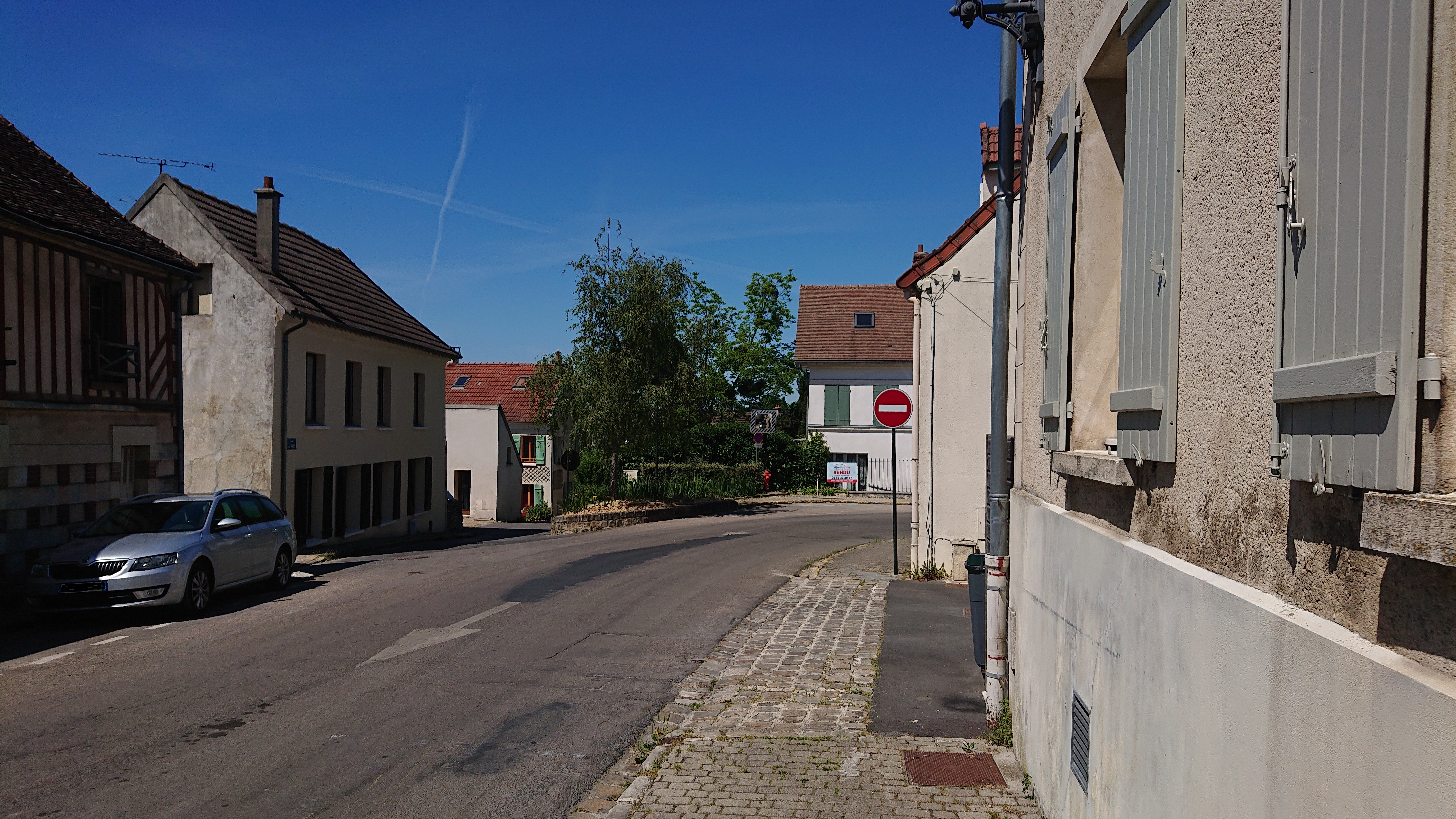 Coupvray bourg centre